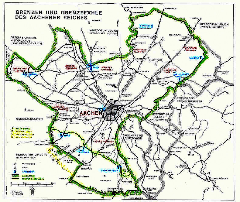 selbst bearbeitete Kopie einer historischen Landkarte Aachens